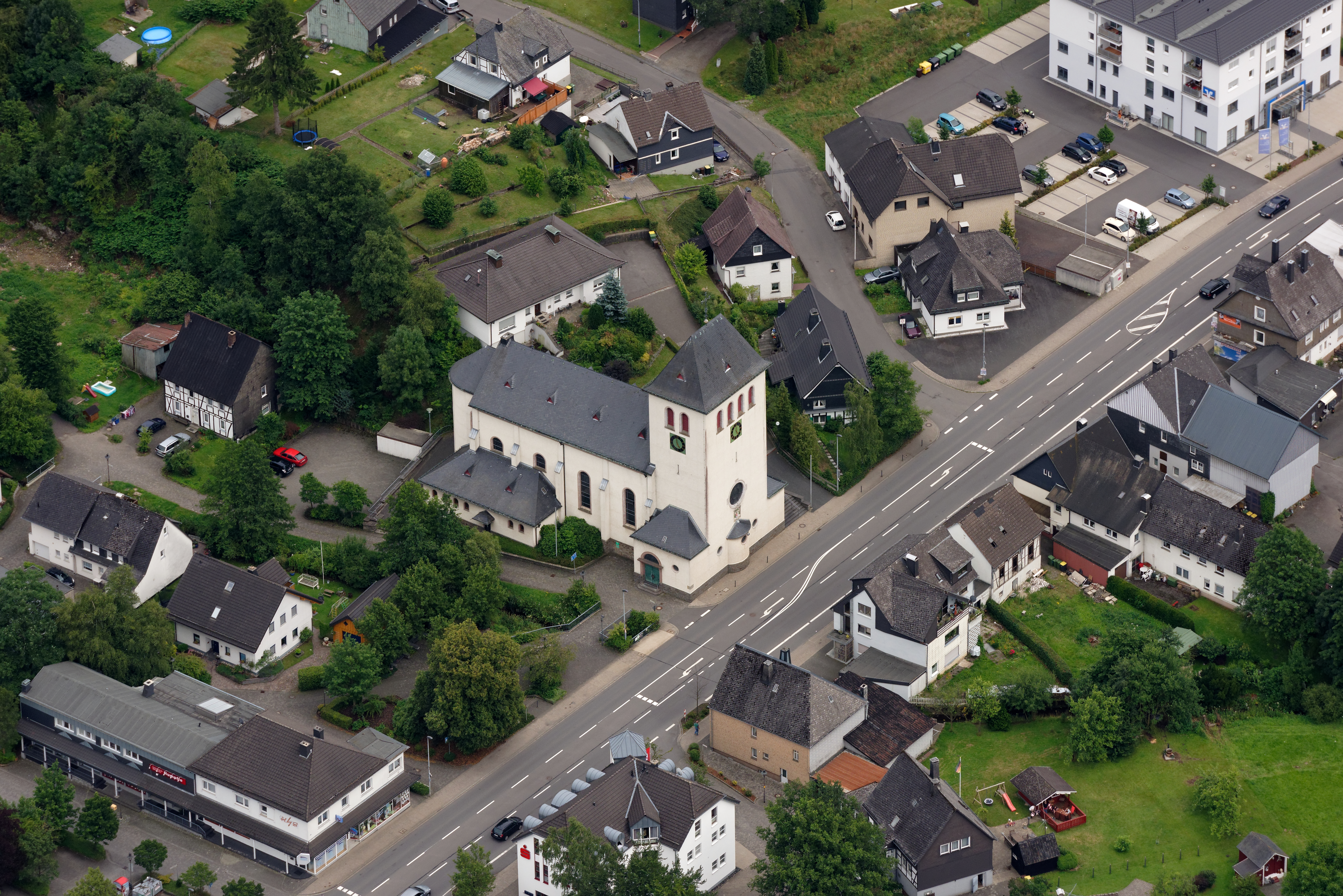 Luftaufnahme: St. Antonius Einsiedler in Gerlingen, Nordrhein-Westfalen